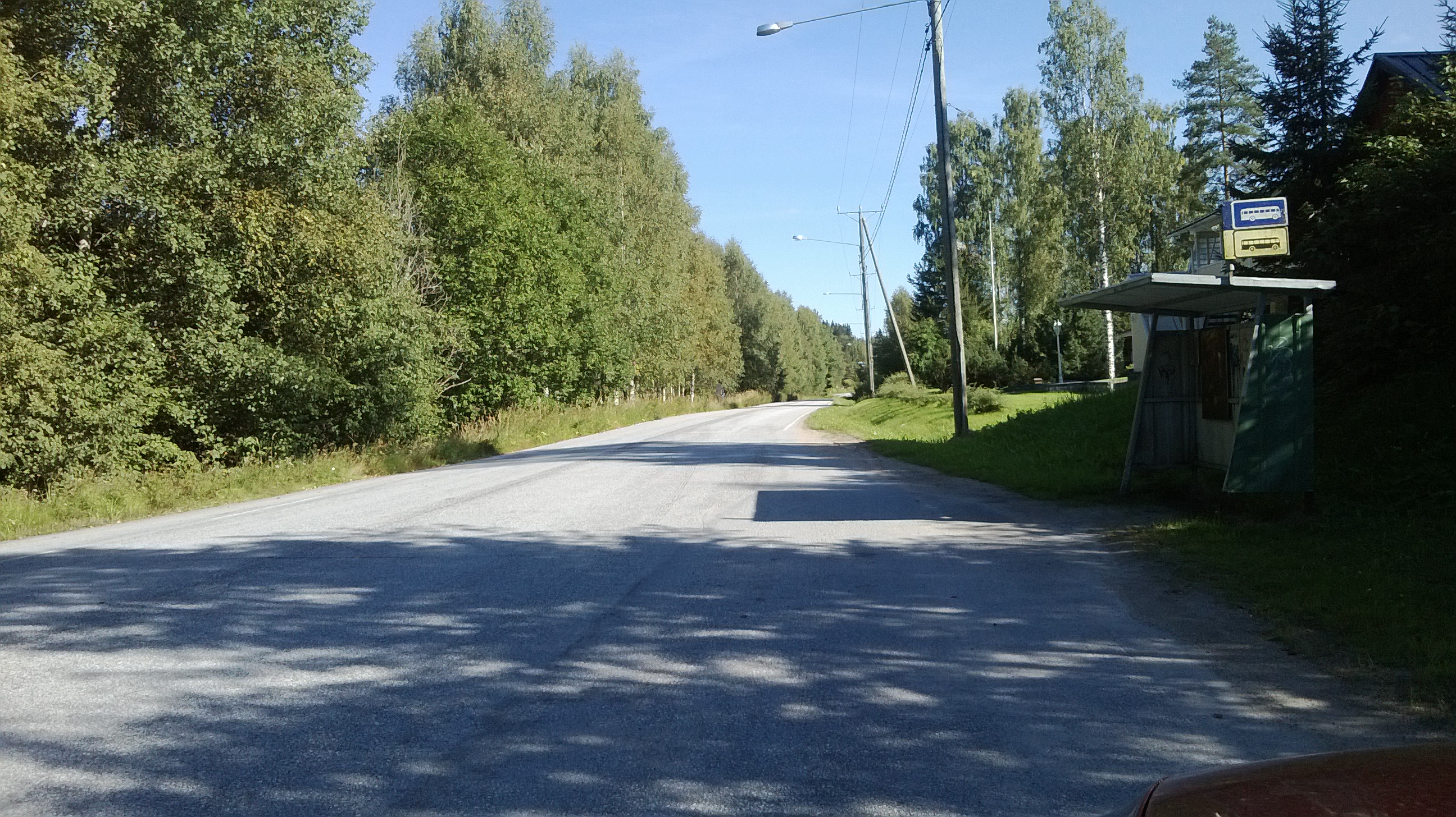 Vesangantie (paikallistie 16685), Ruoke, Jyväskylä